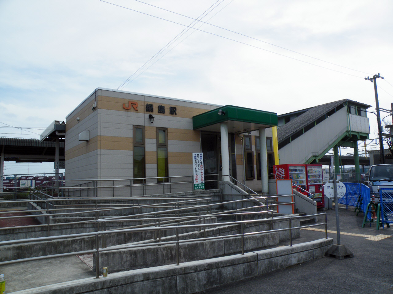 JR九州長崎本線鍋島駅（JR-Kyushu Nabeshima Station）